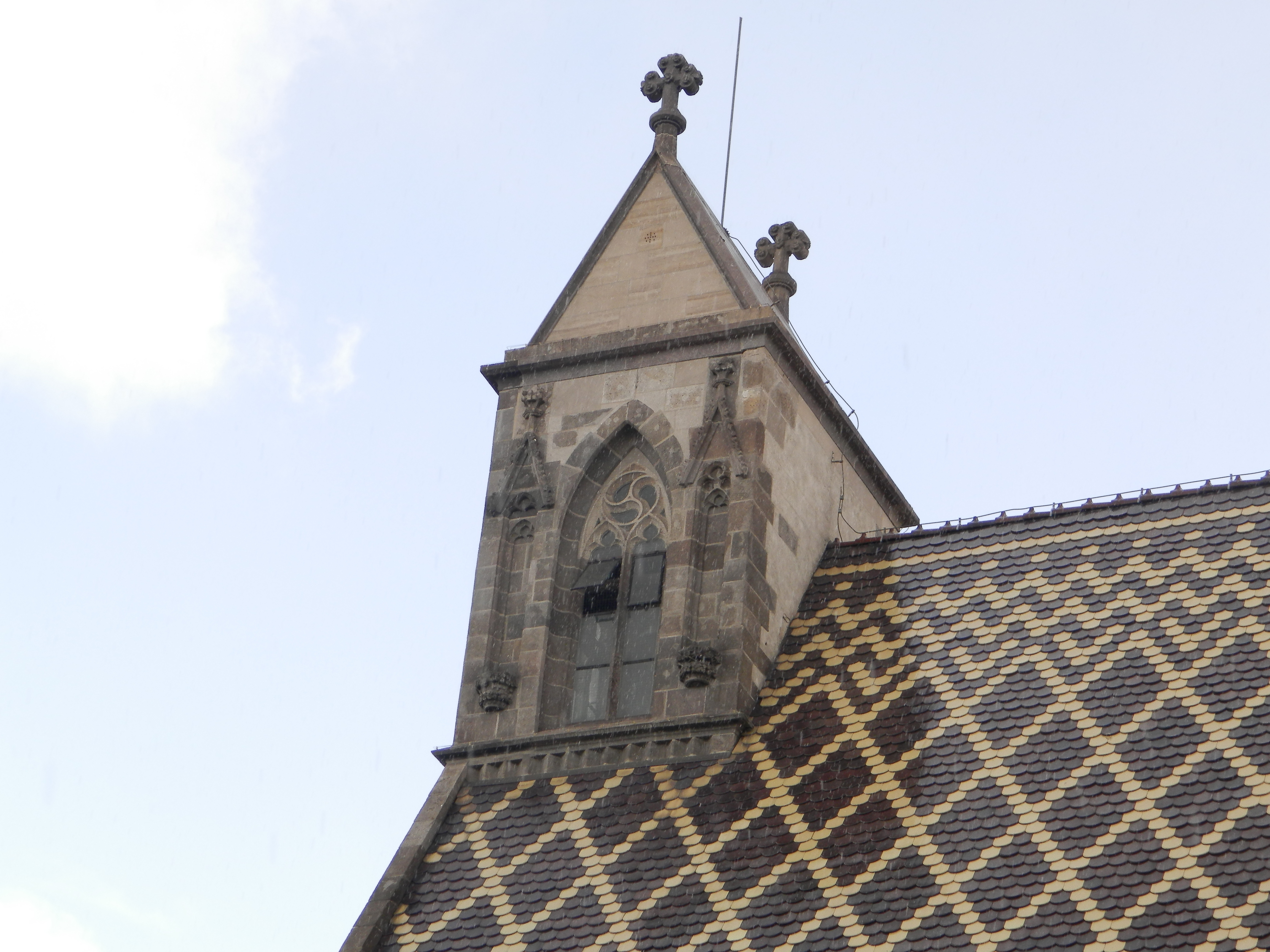 Južná strana štvorhrannej veže kaplnky sv. Michala v Košiciach.